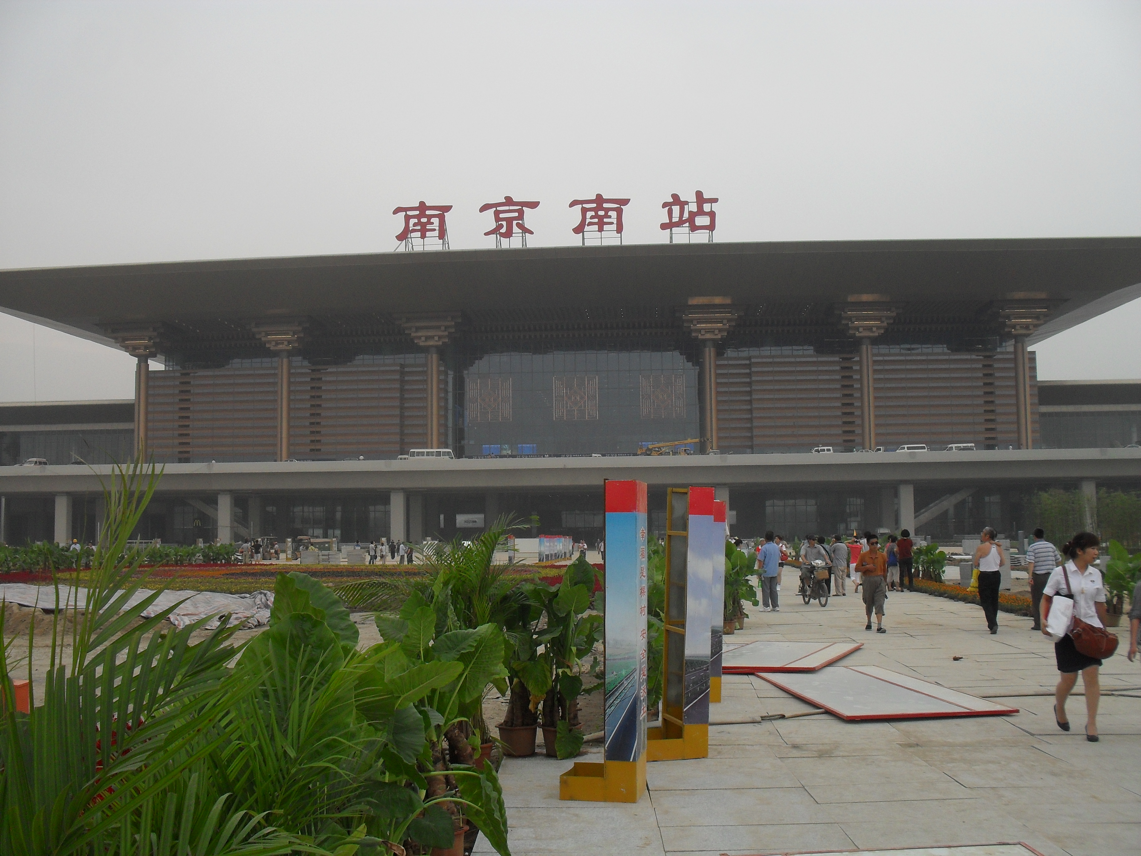 南京南站北广场